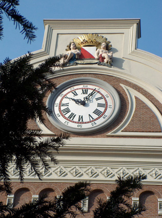 Zelfgemaakte foto